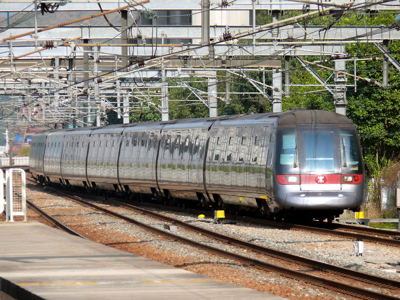 MTR Tung Chung line